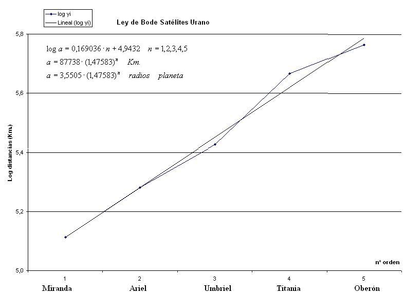 Ajuste logarítmico de las distancias de los satélites de Urano. Origen de la imagen:[1]